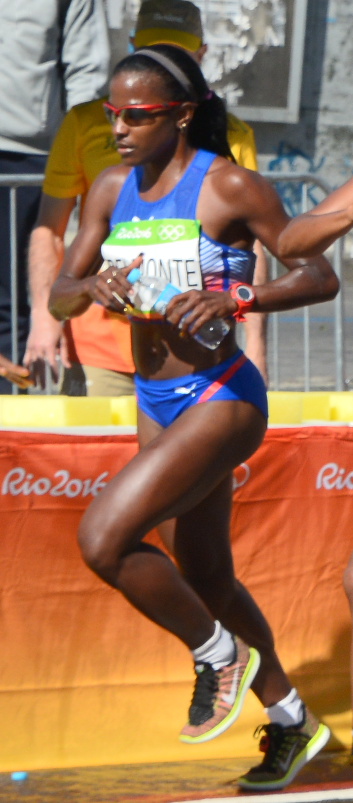 Passage du marathon des jeux olympiques de Rio 2016 dans le centre de Rio